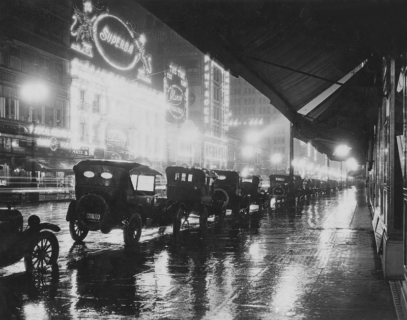 Los Angeles, at night, 1920.